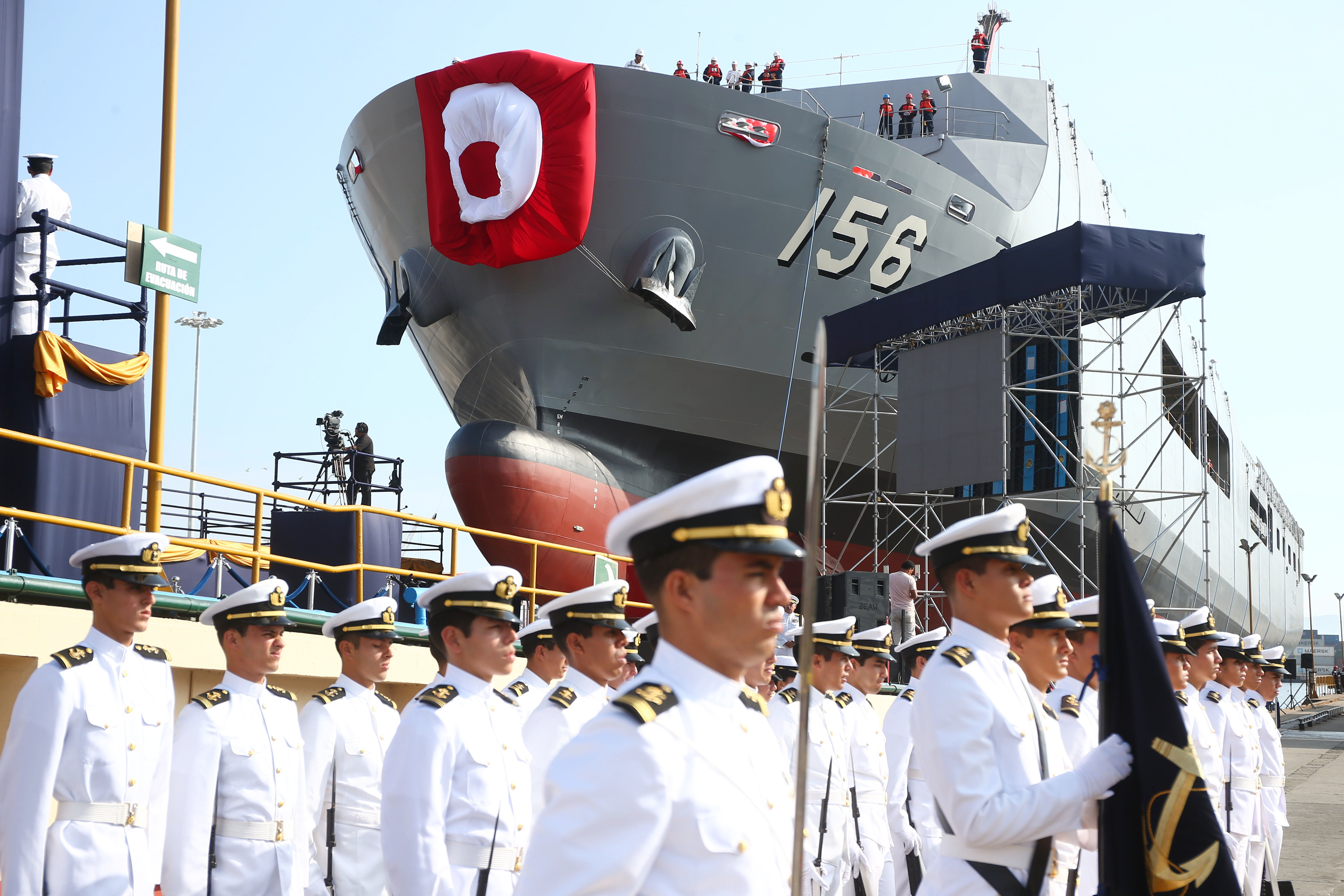 Ceremonia de bautizo y botadura del BAP Pisco (AMP-156)